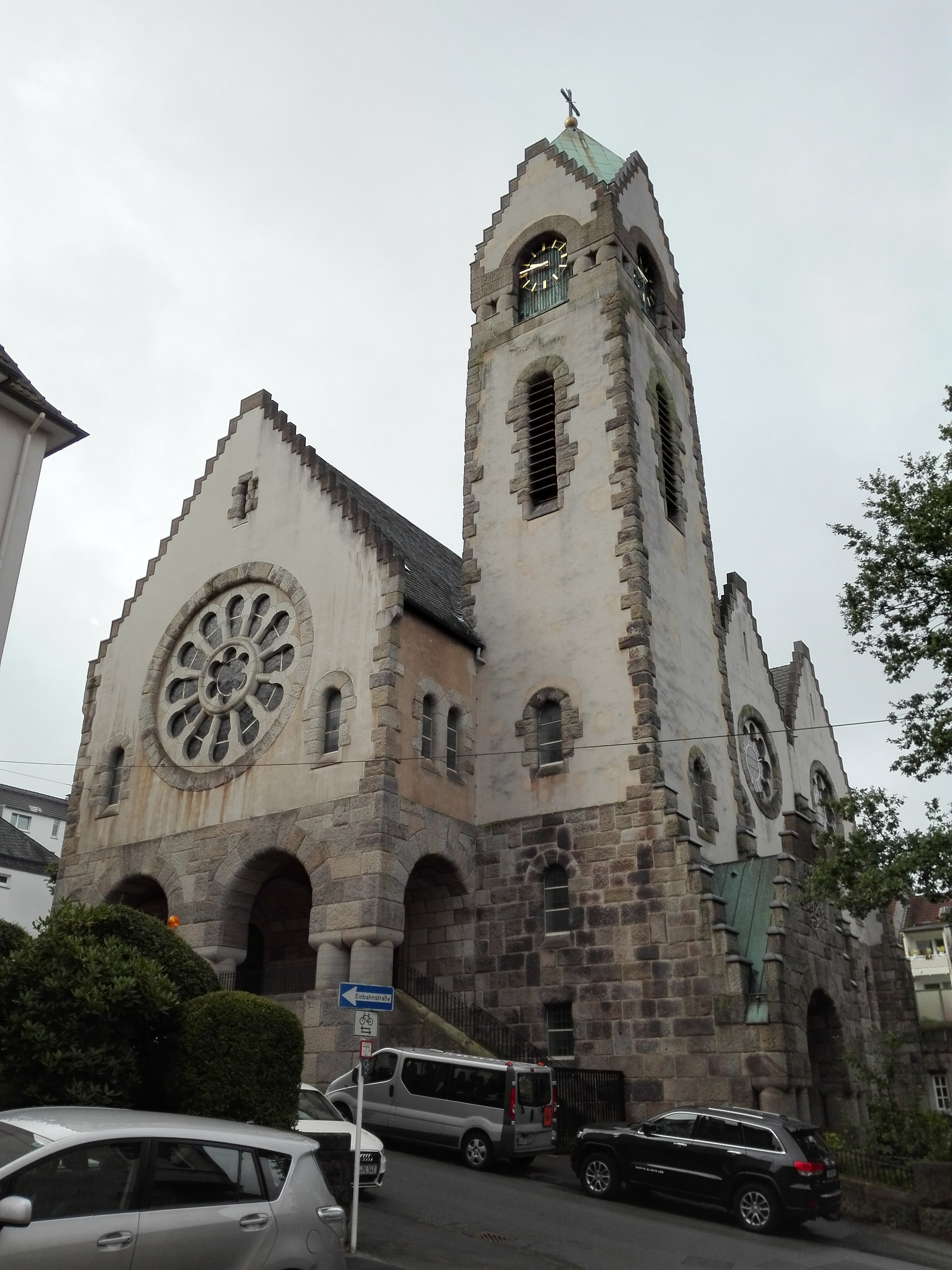 Ansichten der Lutherkirche im August 2017